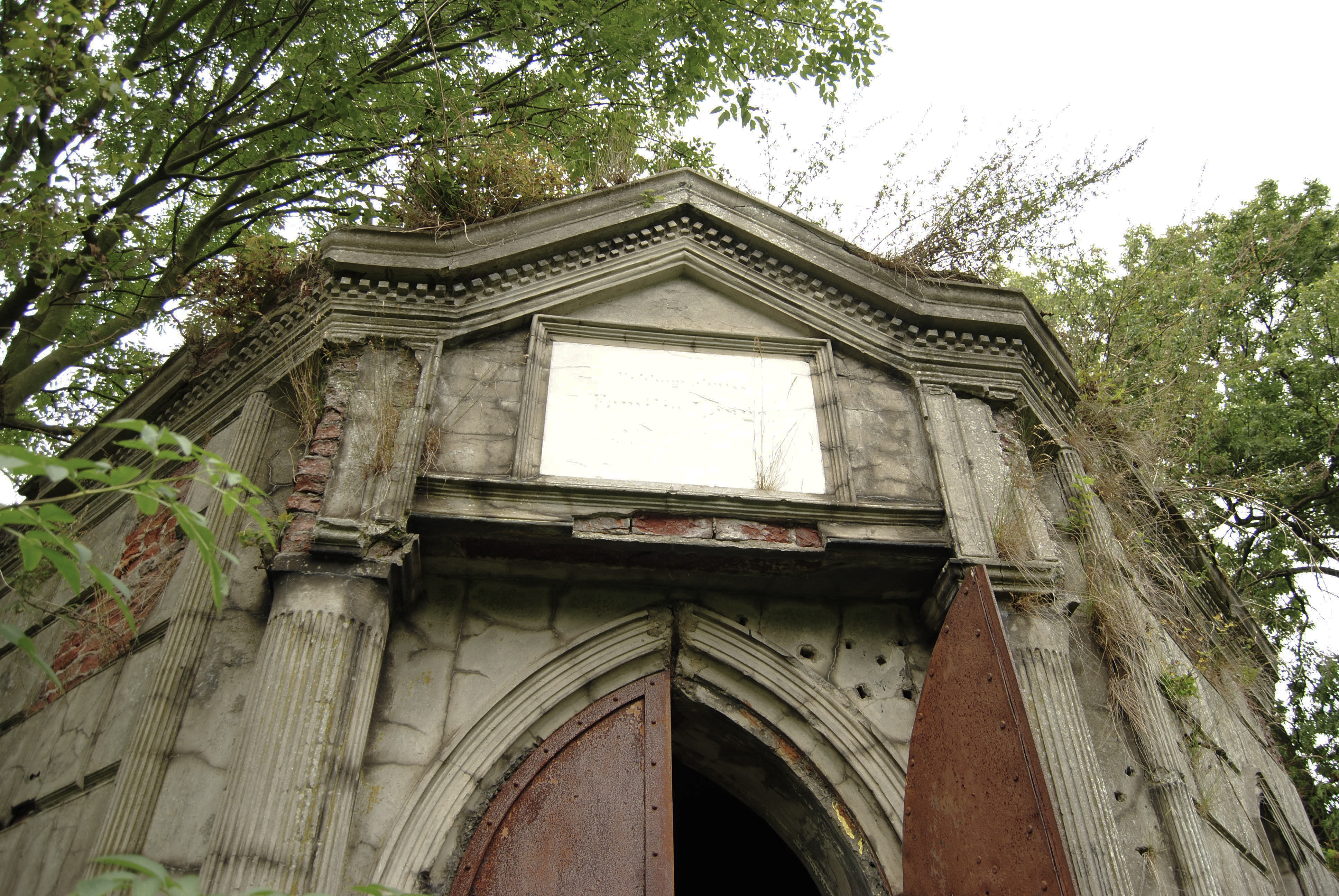 Rybno - kaplica grobowa rodziny Lange, po 1880 r. (zabytek nr 2638/A)